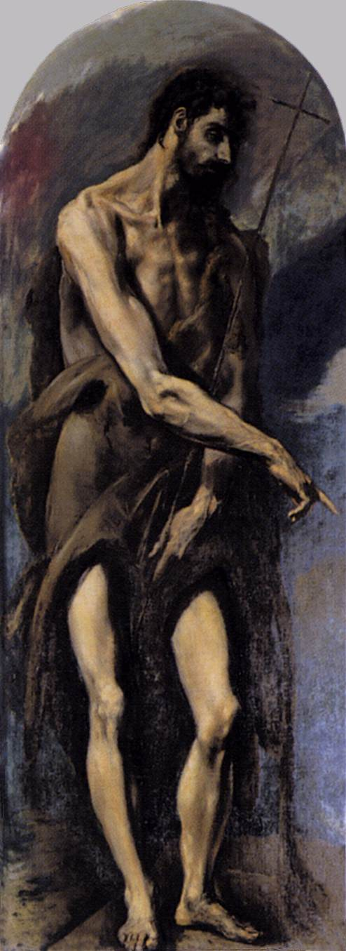 La obra representa al profeta San Juan Bautista, precursor del Mesías.